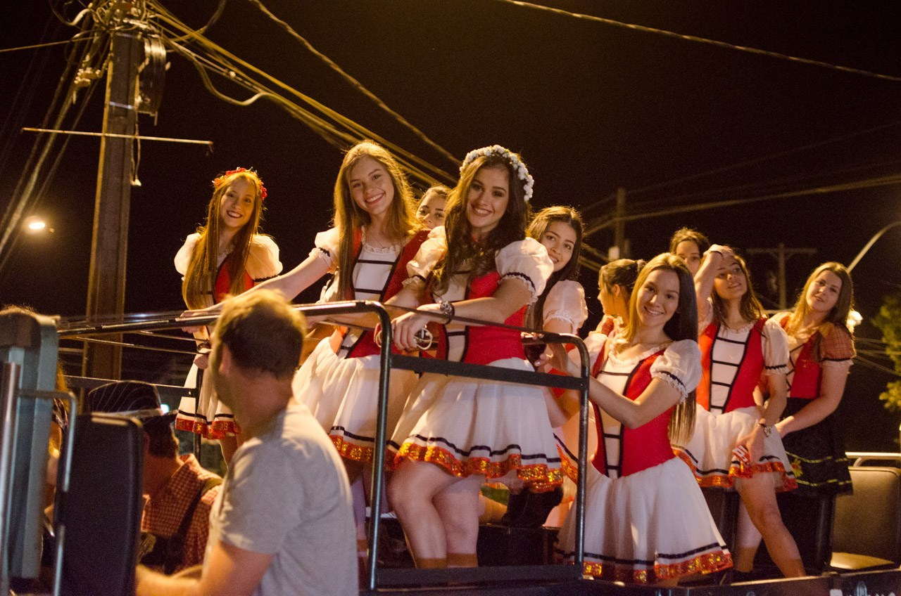 En las calles del distrito de Obligado, las bailarinas de la escuela de danza municipal invitan a todo el público a presenciar la fiesta y probar la cerveza, en una caravana.